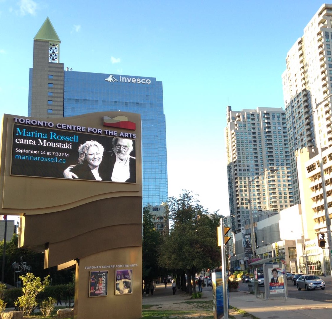 Neó Canada